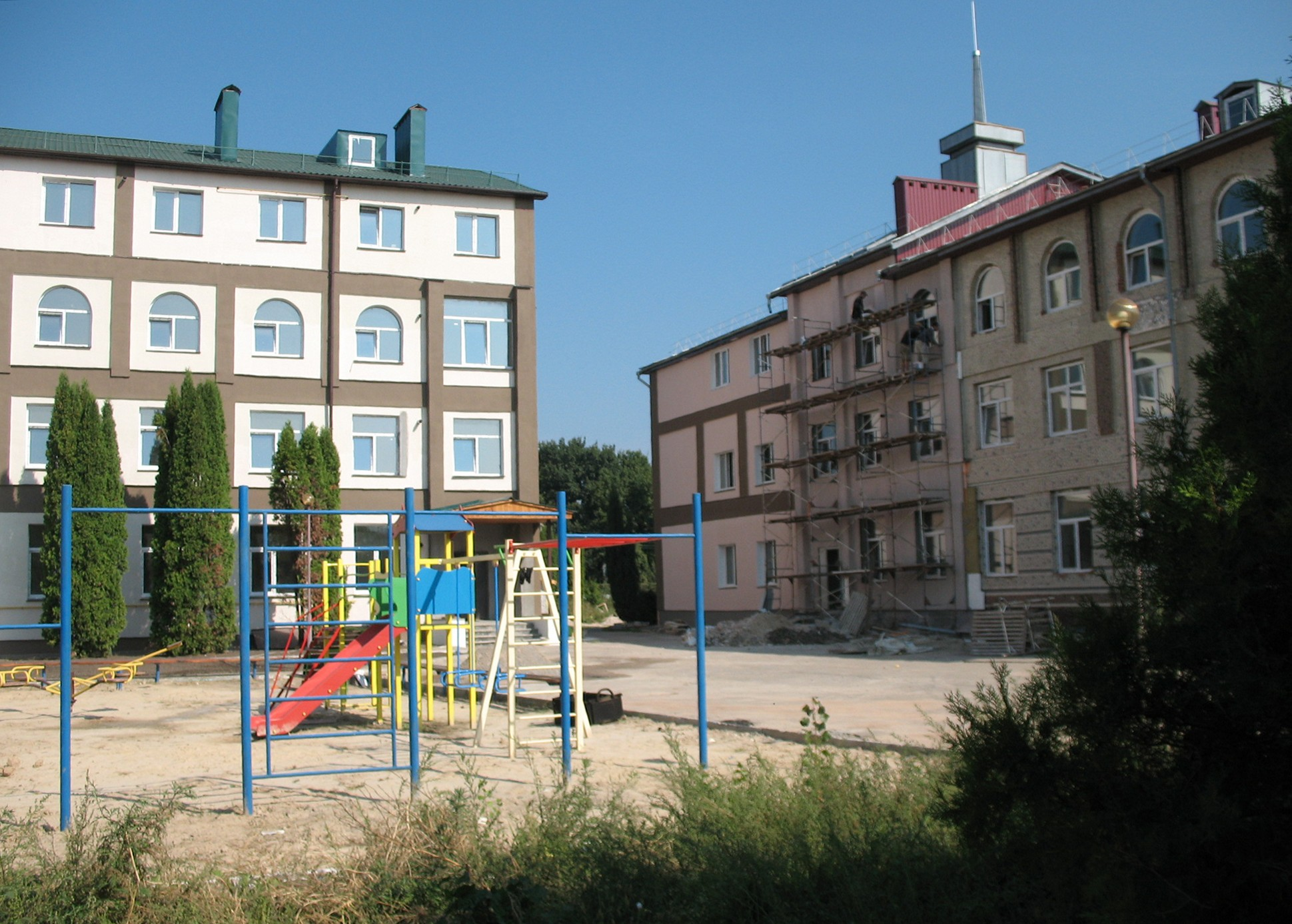 Колишні лабораторний та лабораторно-виробничий корпуси ТОВ "НЛСП", які були переоблаштовані "переможцями" аукціону у житлові будівлі. Ніжин. 2017 р.